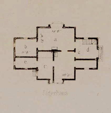 Klein Glienicke, Unterförsterei (Jägerhaus), Grundriss